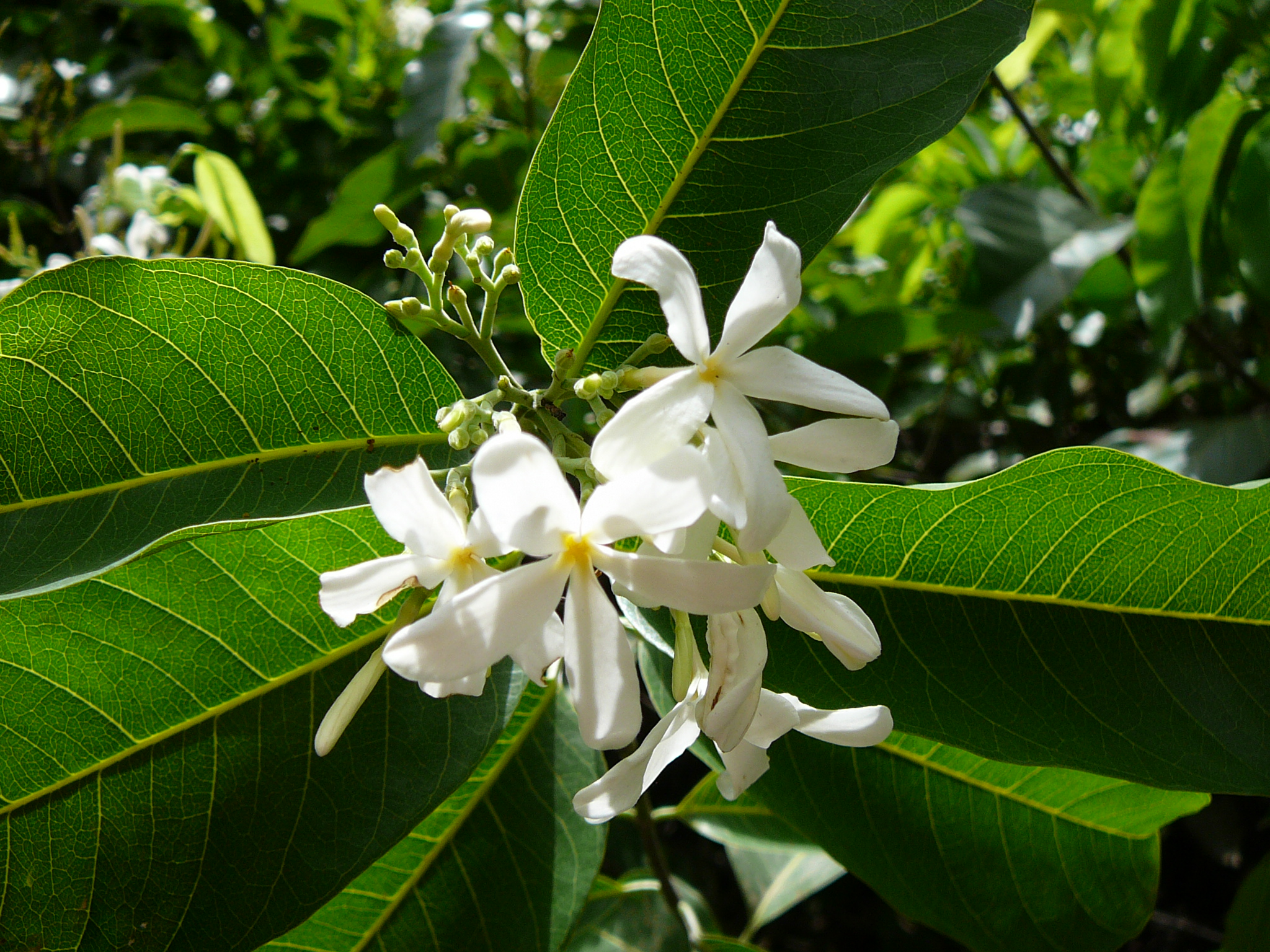 Saba senegalensis